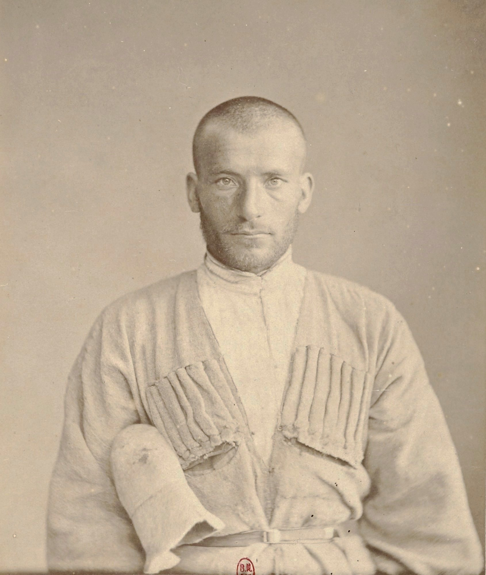 Barry (capitaine). F. 17. Ossèthe (Ossète), Koban. Mission scientifique de Mr Ernest Chantre. 1881